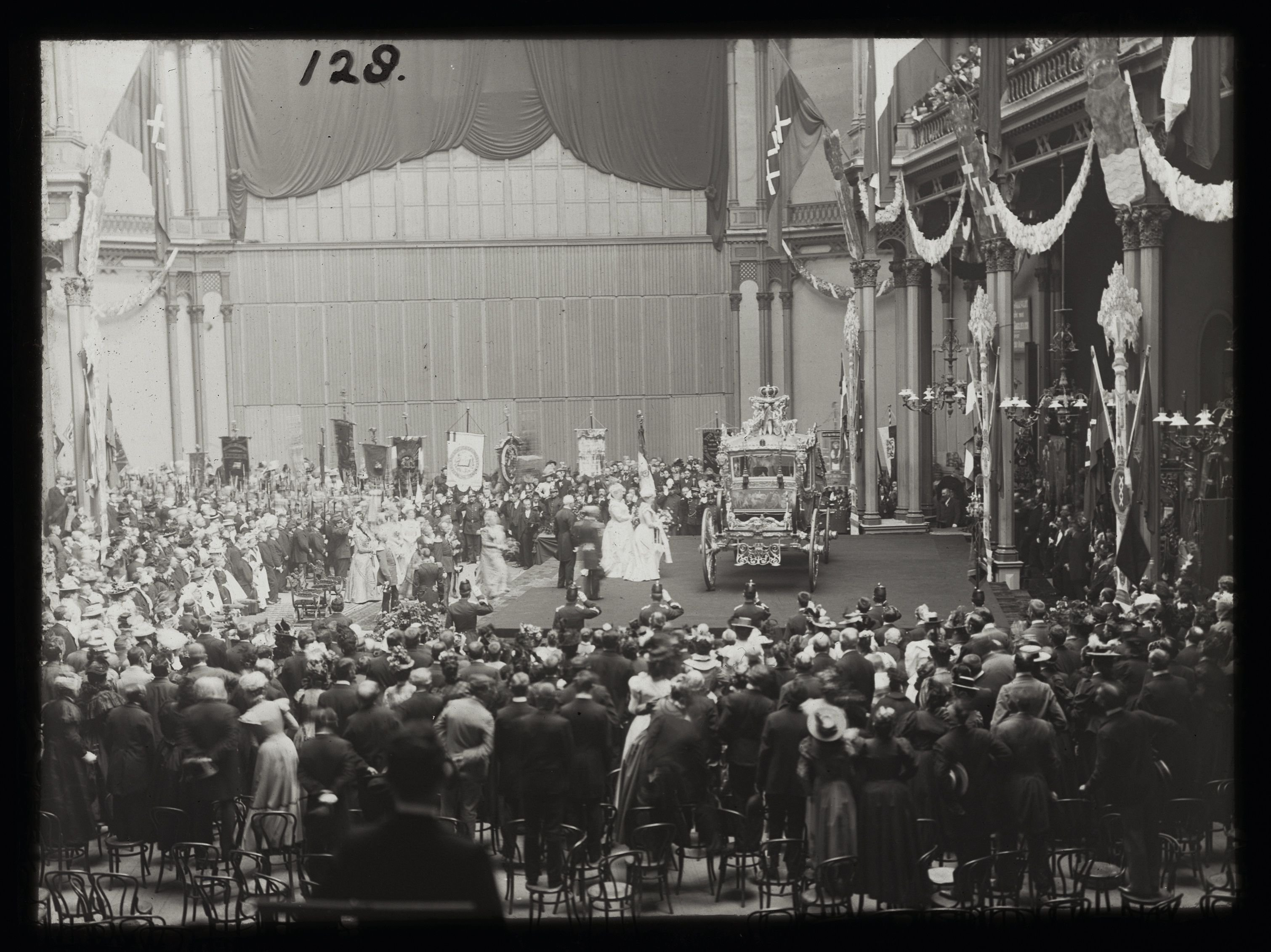 Aanbieding van de Gouden Koets. Koningin Wilhelmina aanvaardt de Gouden Koets Een geschenk van de Amsterdamse burgerij ter gelegenheid van haar inhuldiging, in het Paleis voor Volksvlijt, op 7 september 1898 om 13.00 uur.